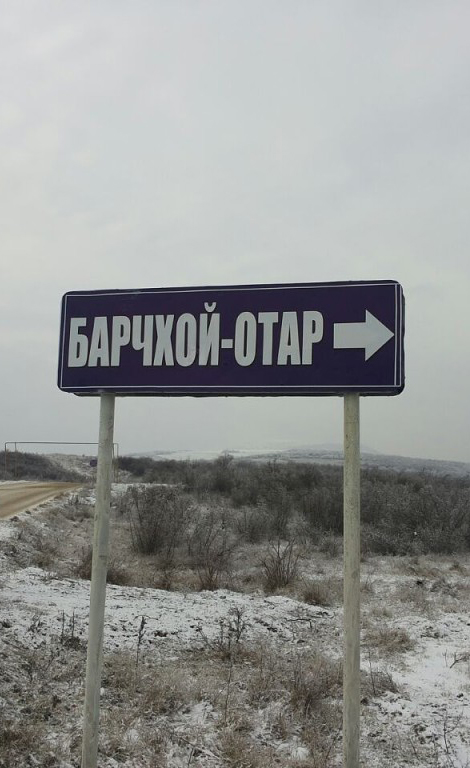 Ауховское село Барчхой-Отар